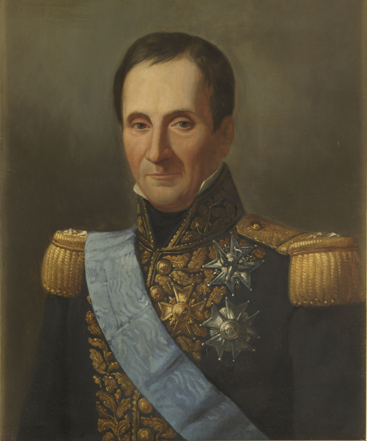 Amiral Edouard-Jacques, comte Burgues-Missiessy (1756-1837)